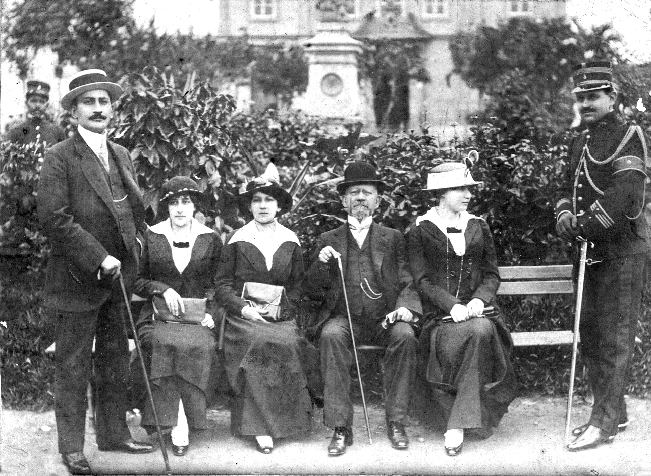 Conselheiro Rodrigues Alves, presidente do Brasil de 1902 a 1906, e família na antiga igreja de Aparecida em 1913. Legenda: Da esquerda para a direita: Oscar Rodrigues Alves, Isabel Rodrigues Alves, Maria Rodrigues Alves. Conselheiro Francisco de Paula Rodrigues Alves, Zaïra Rodrigues Alves e capitão Eduardo Lejeune (ajudante de ordens).